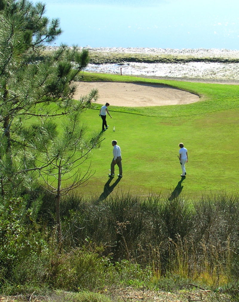 Golfe no Algarve Valter Jacinto